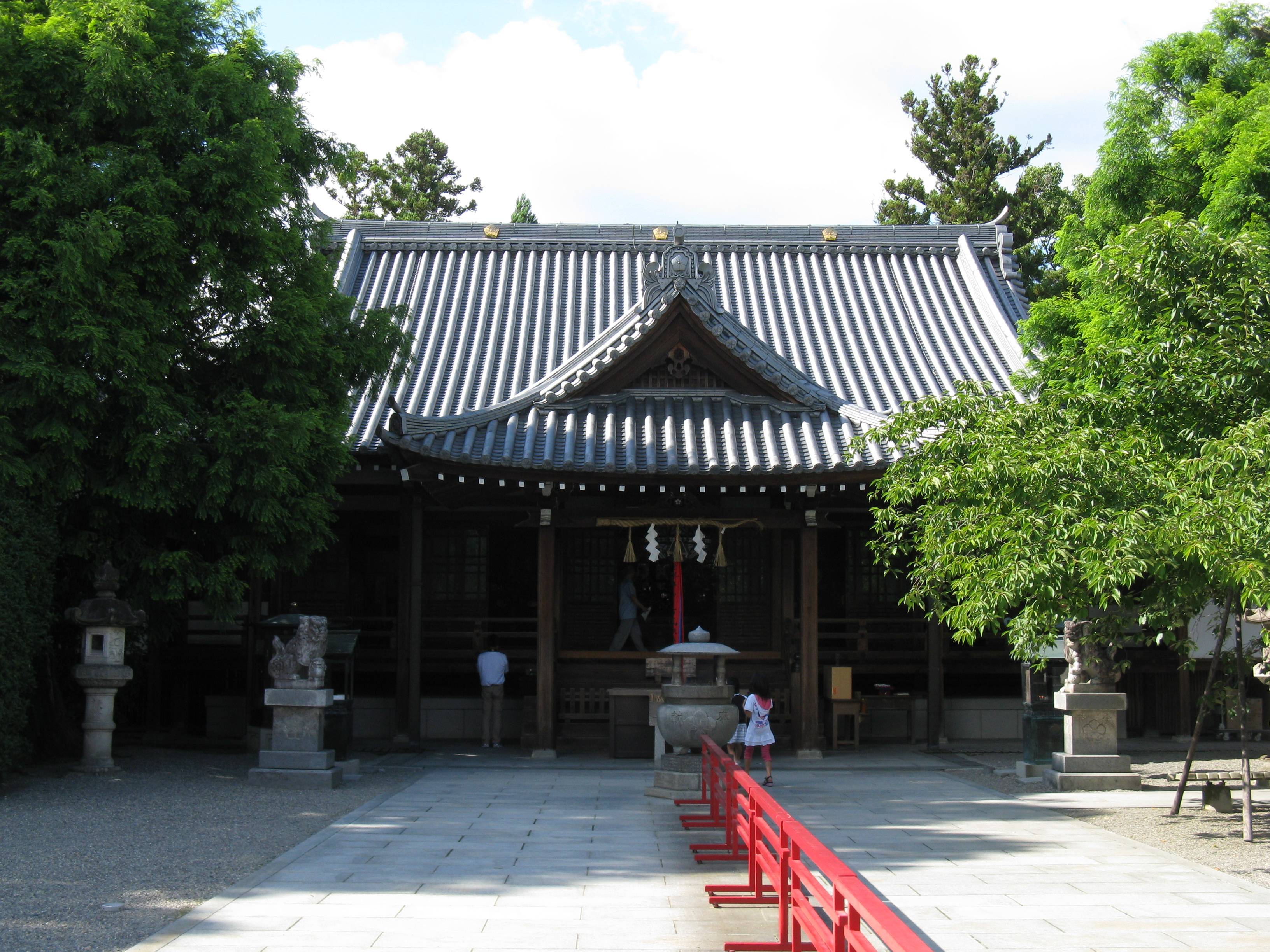 辯天宗総本山 宇賀山妙音院如意寺 本堂